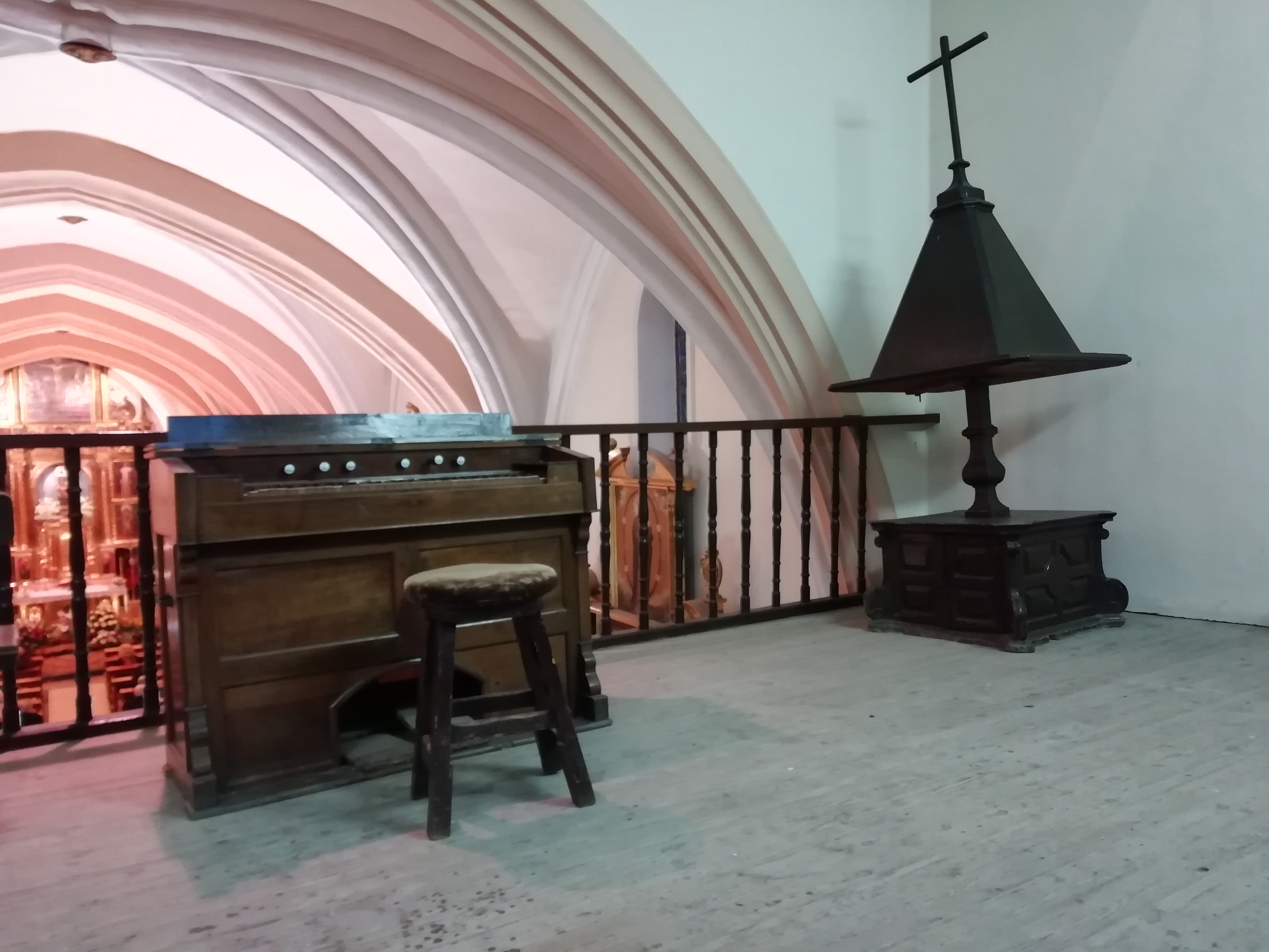 Coro alto en el que se ve un Harmonium, un facistol y parte de los arcos de la nave.